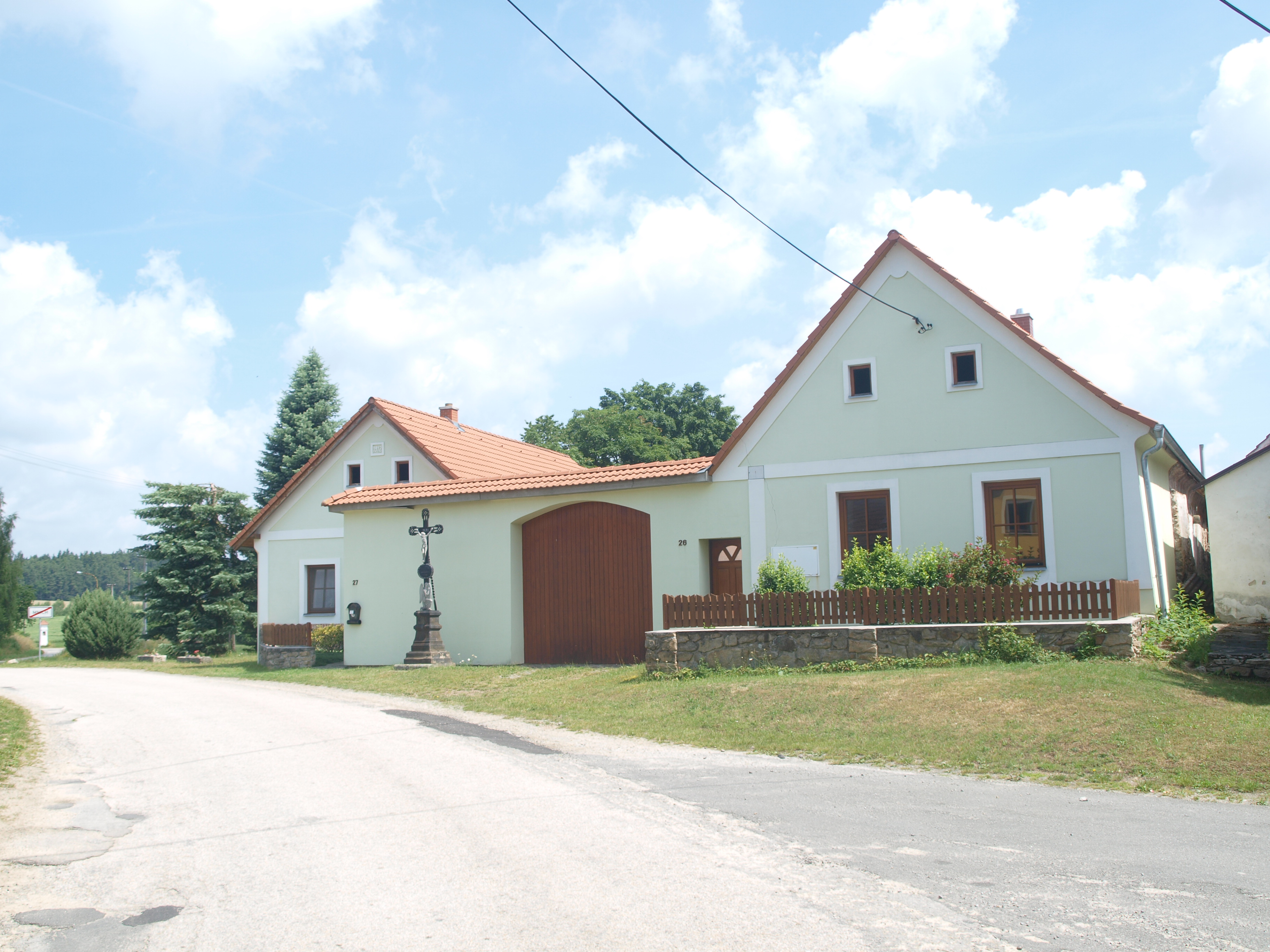 Usedlost v obci Mnich